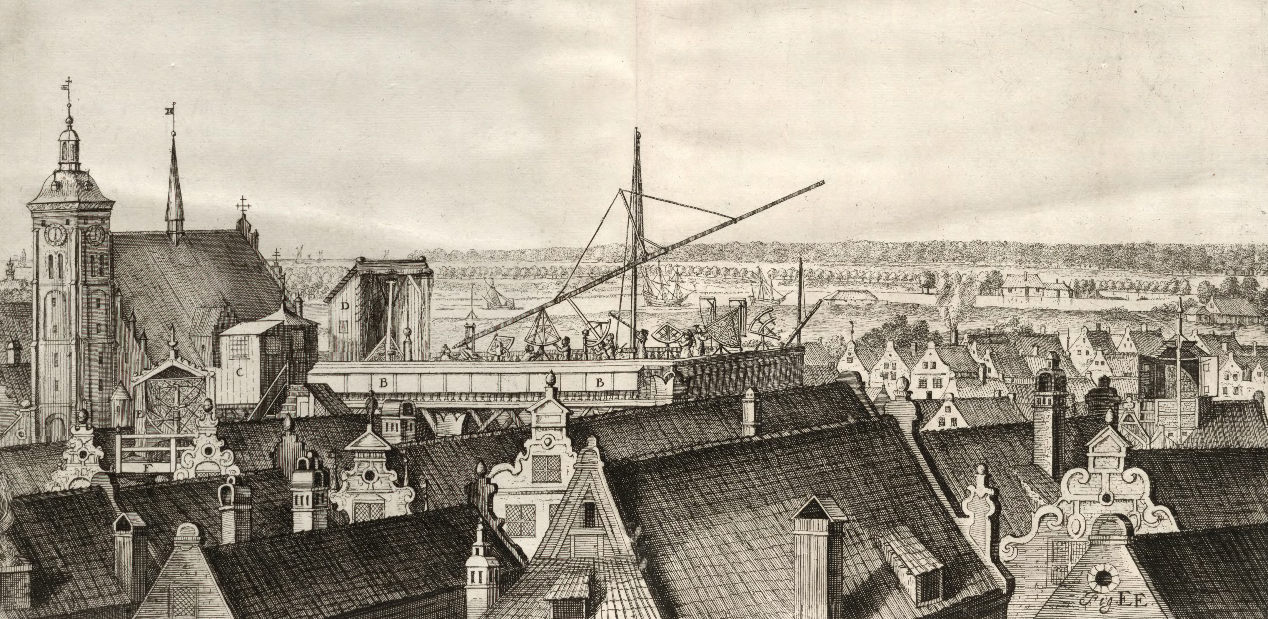 Obserwatorium Jana Heweliusza, ryc. z pracy Jana Heweliusza "Machinae Coelestis"